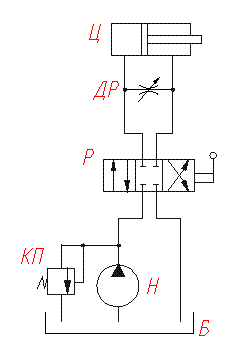 ГИДРОСХЕМА С ПАРАЛЛЕЛЬНО ВКЛЮЧЁННЫМ ДРОССЕЛЕМ